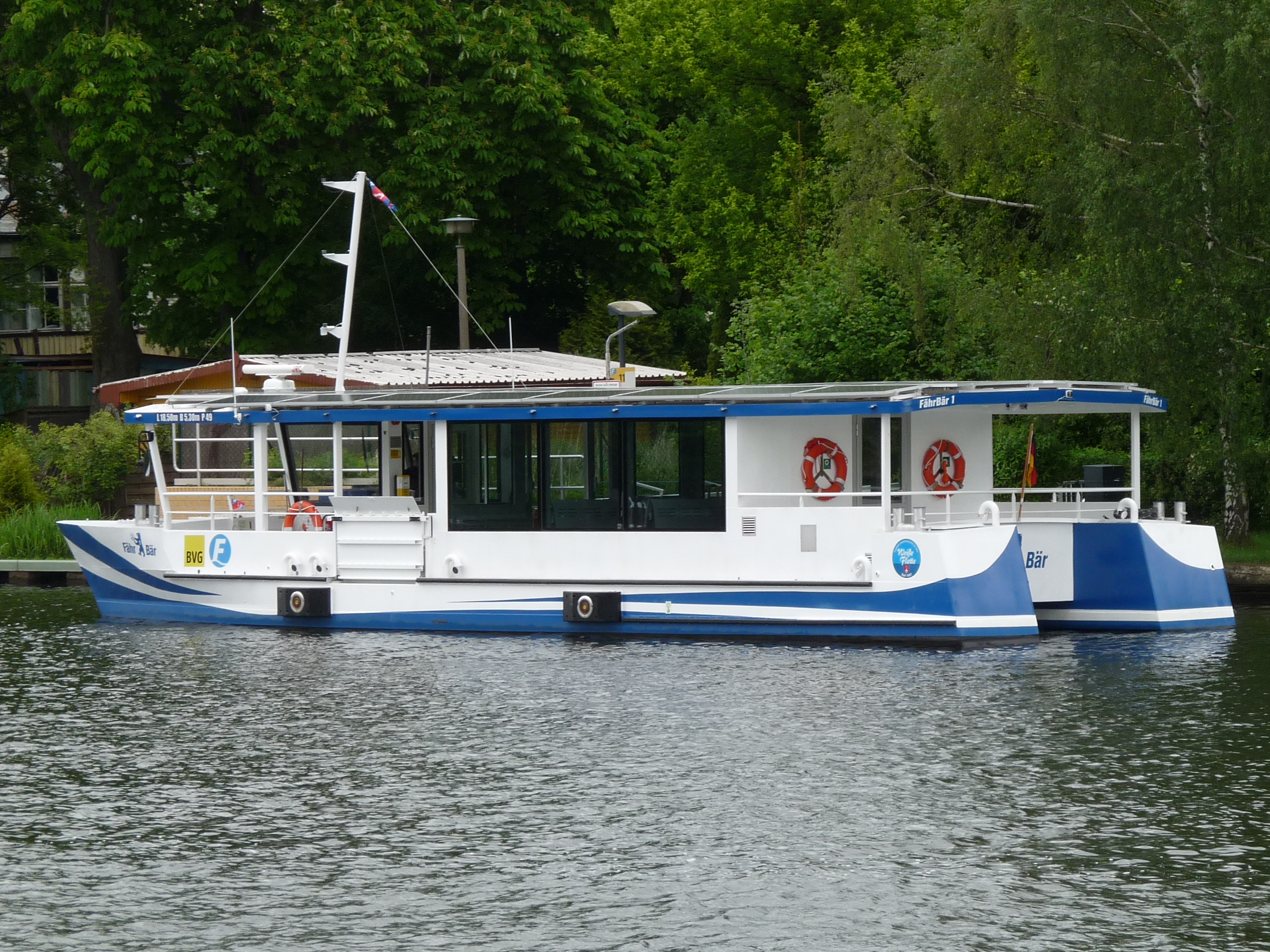 Die Elektrofähre Fähr-Bär 1 der Linie F 11 in Berlin.